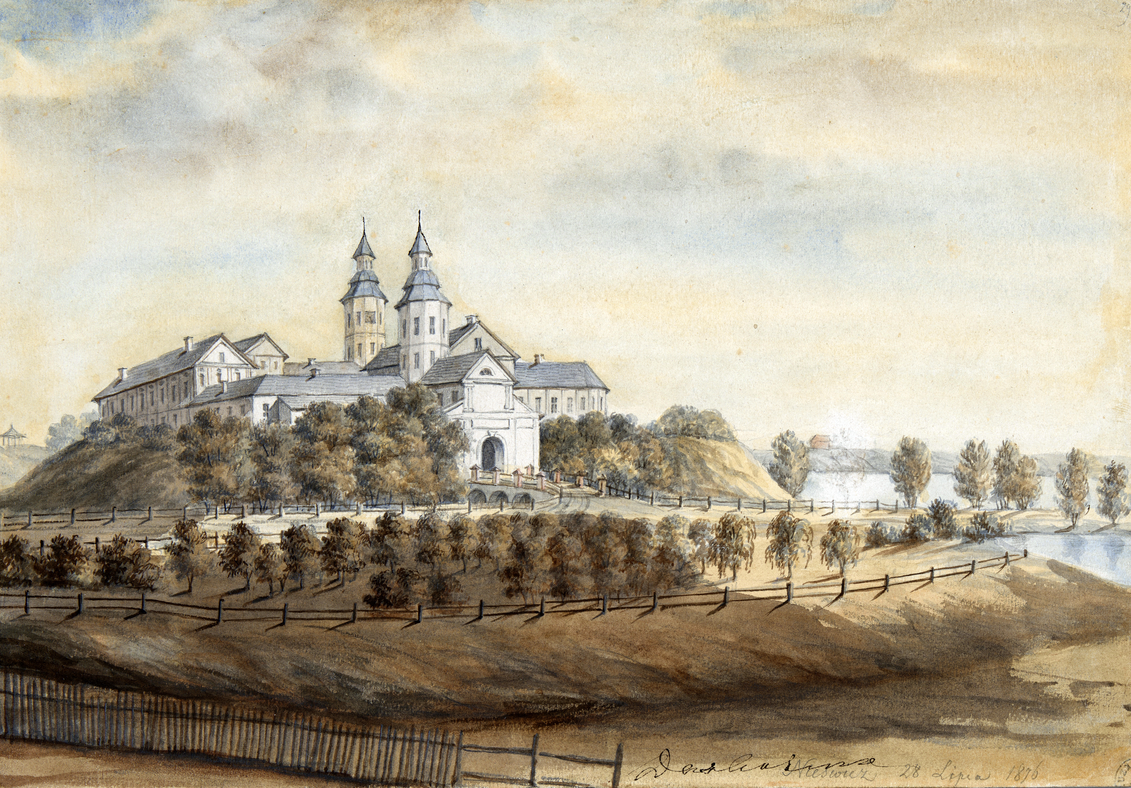 Беларуская (тарашкевіца): Нясьвіж (Niaśviž), замак Радзівілаў (Radzivił)